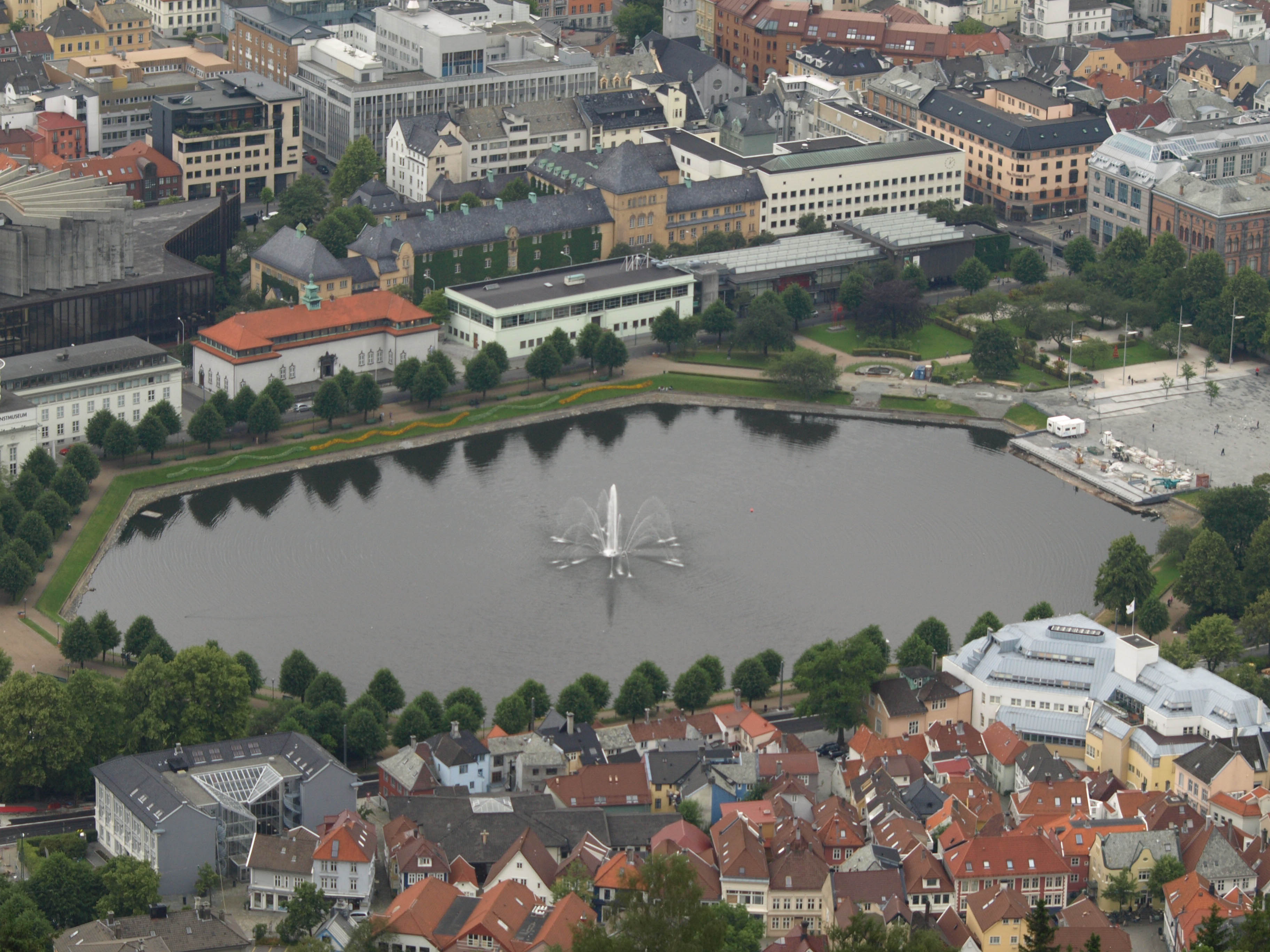 Lake Lille Lungegårsvannet in Bergen, Norway